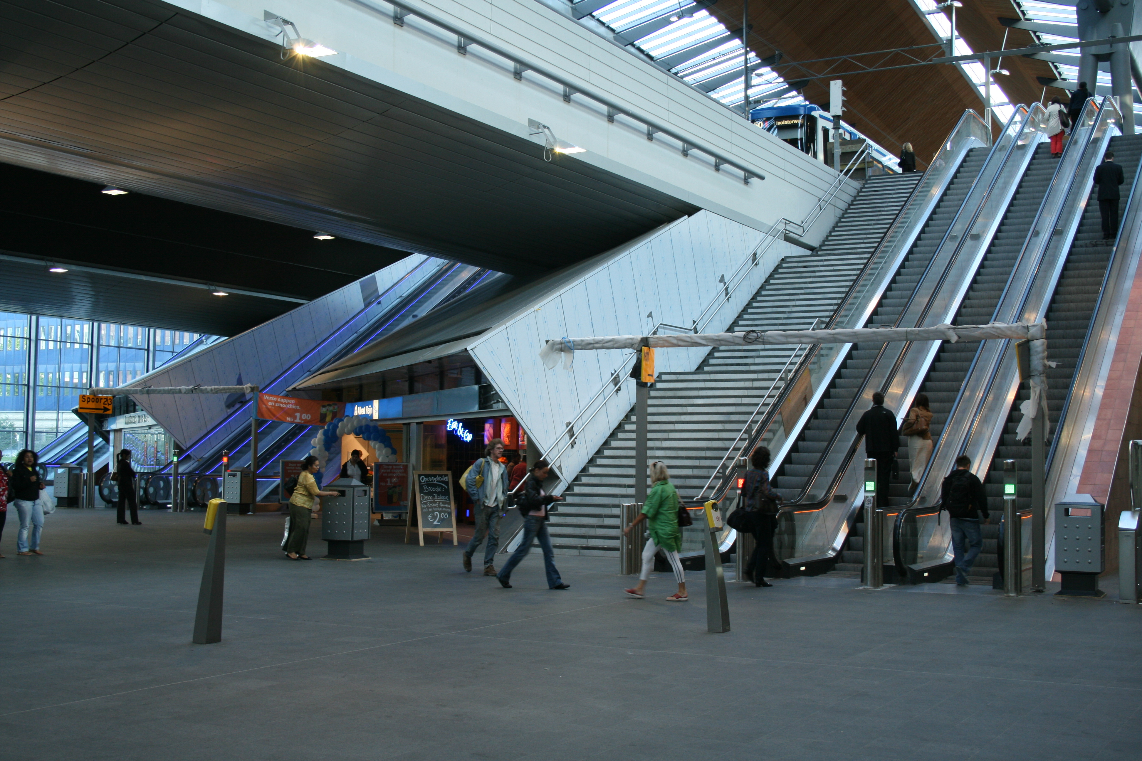 Stationshal Amsterdam Bijlmer Arena met roltrappen metroperron